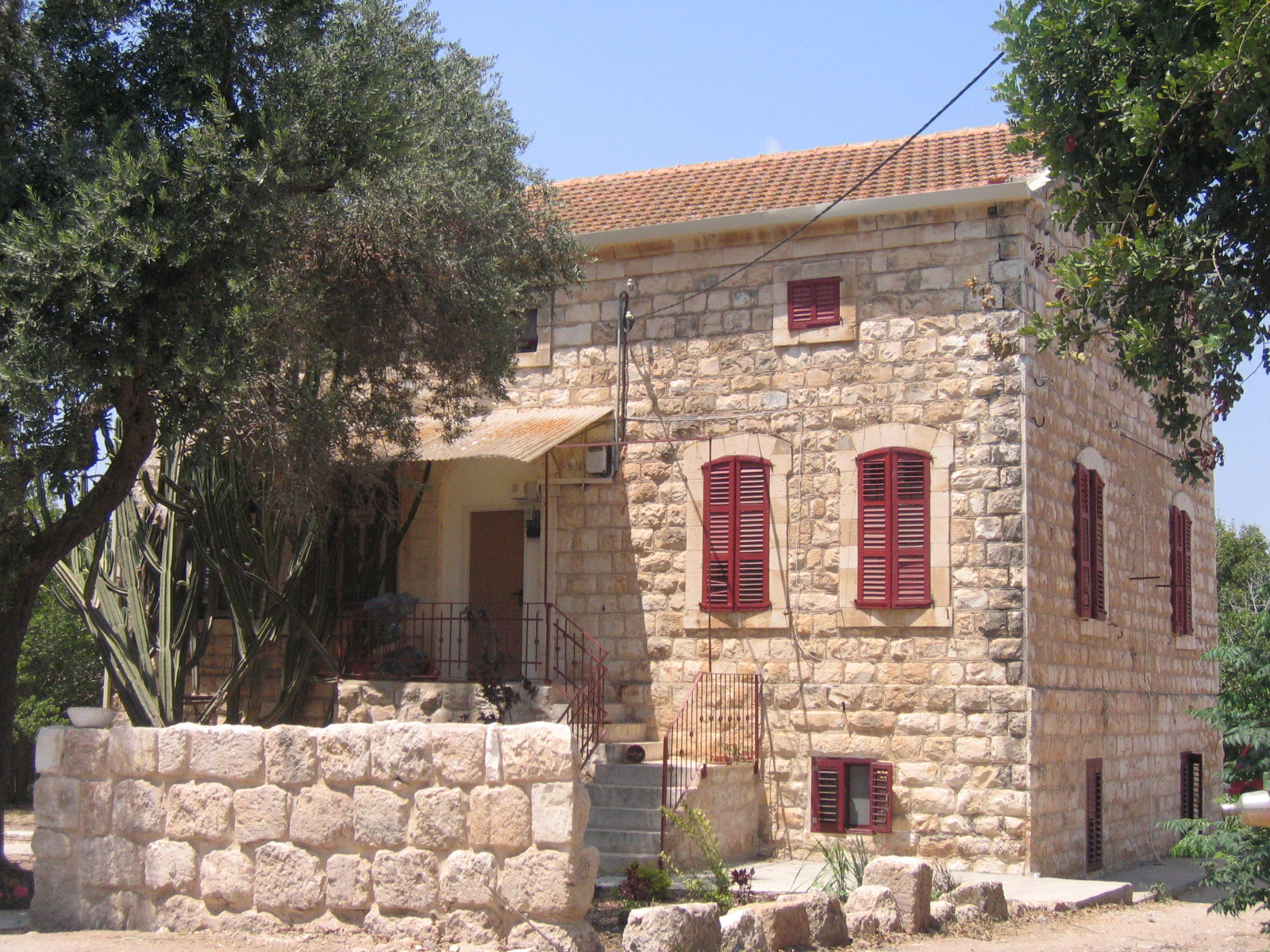 בית טמפלרי בבית לחם הגלילית תמונה שצילמתי אסף 09:18, 13 אוגוסט 2005 (UTC)